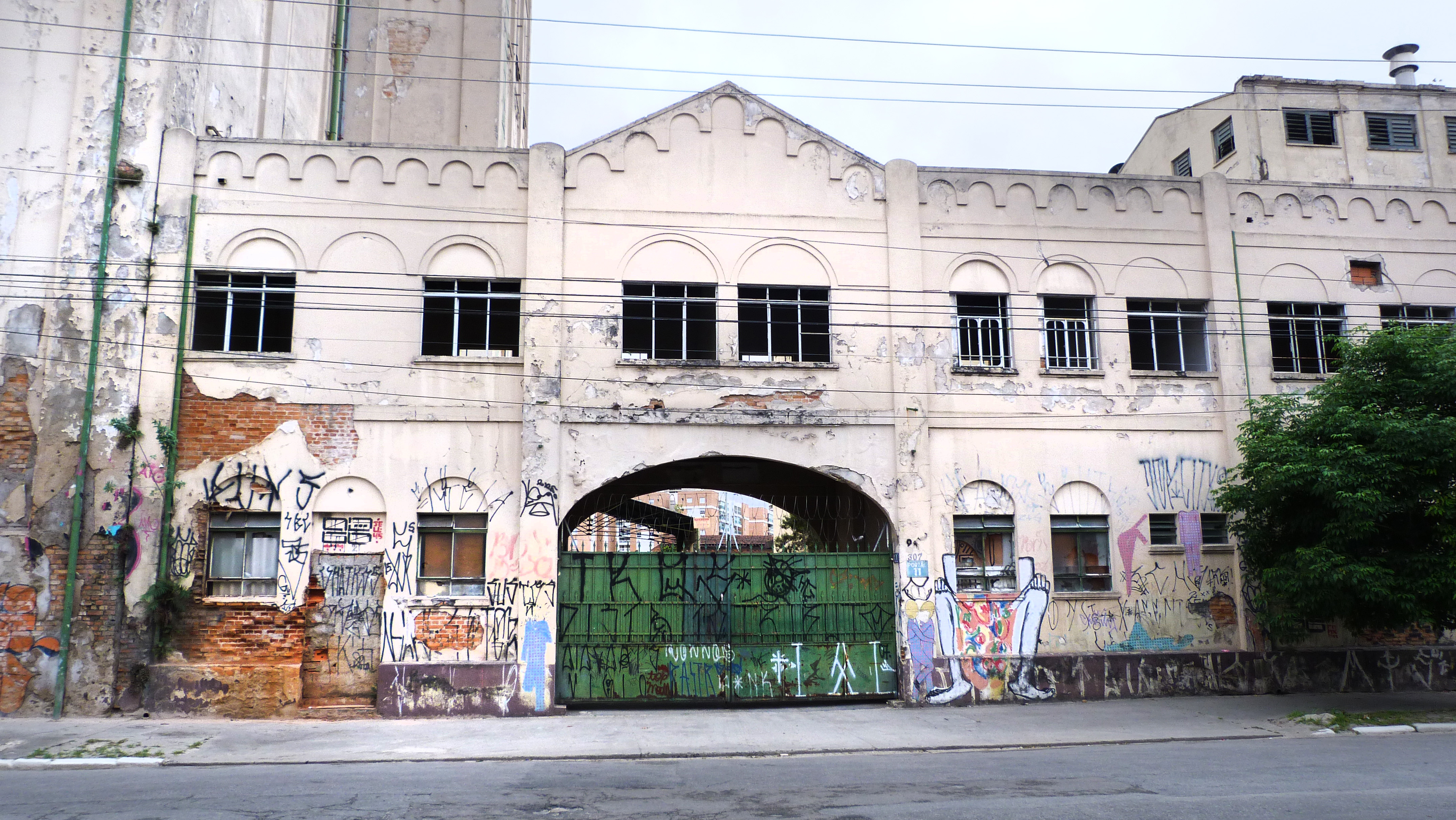 Entrada da Fábrica de Cerveja. À esquerda, está o conjunto de tanques de fermentação, as janelas são dos escritórios e dos laboratórios onde os cervejeiros analisavam amostras e promoviam os ajustes necessários (principalmente a adição de mais ou menos lúpulo) para garantir a qualidade e características de cada produto.